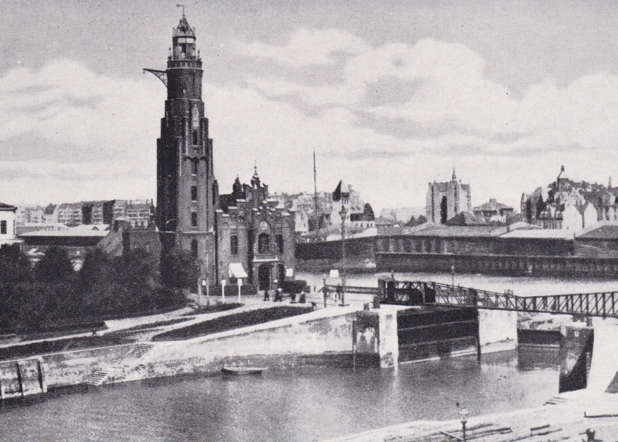 Geöffnetes Hafensperrtor mit Fußgängerbrücke am Neuen Hafen in Bremerhaven.